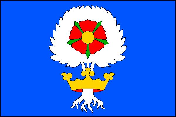 Vlajka obce Bukovice (okres Náchod)